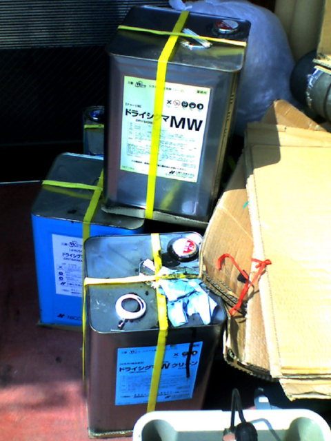 5gallon can(一斗缶)